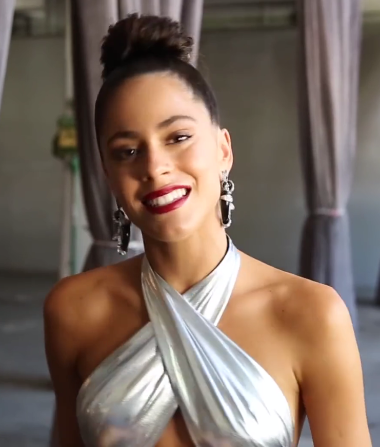 Martina Stoessel en grabación del video "Si tú te vas"